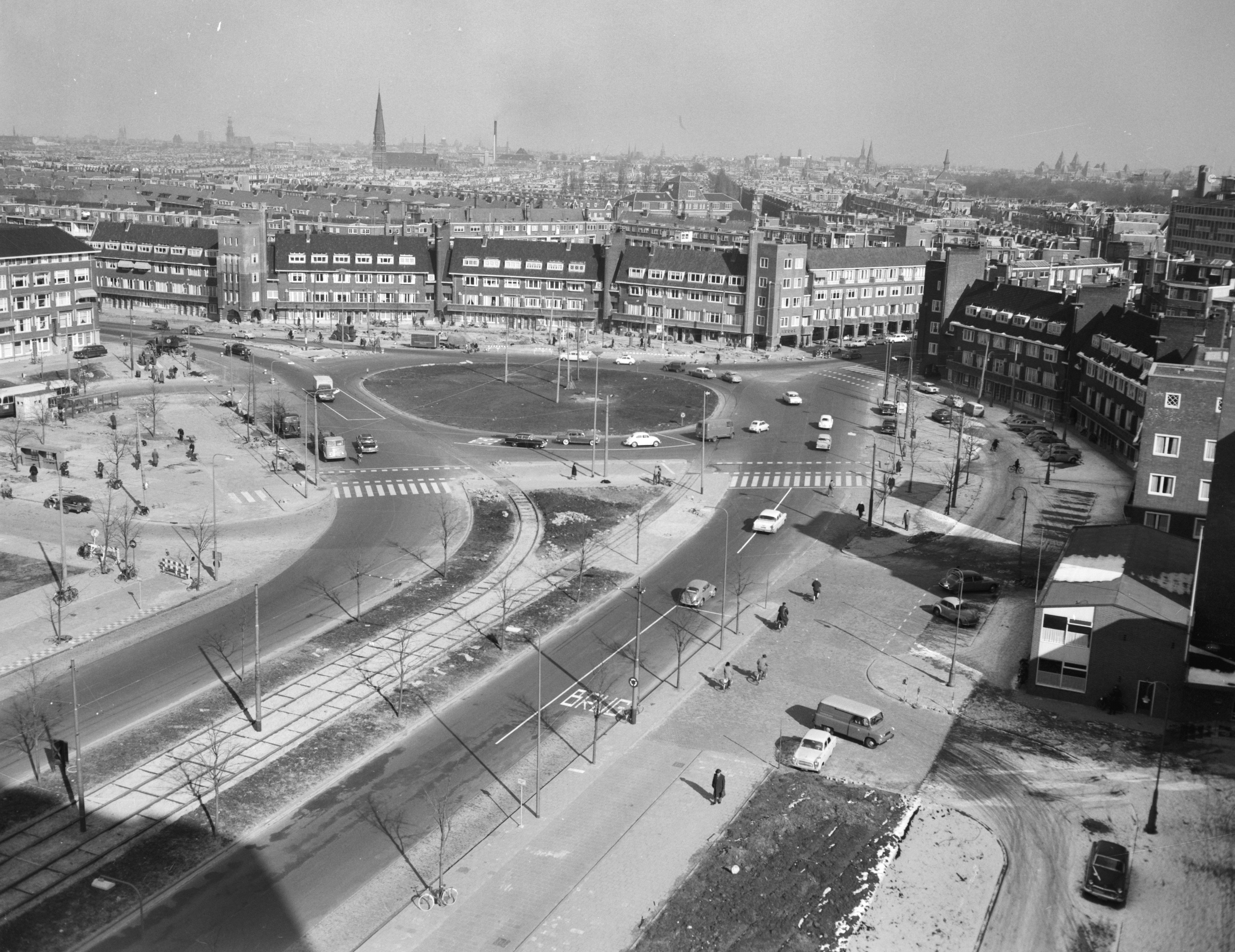 Collectie / Archief : Fotocollectie Anefo Reportage / Serie : [ onbekend ] Beschrijving : 63 Stoplichten voor Surinameplein Datum : 16 maart 1962 Fotograaf : Bilsen, Joop van / Anefo Auteursrechthebbende : Nationaal Archief Materiaalsoort : Negatief (zwart/wit) Nummer archiefinventaris : bekijk toegang 2.24.01.04 Bestanddeelnummer : 913-6553 Reacties Geplaatst door Maaike op 29 november 2013 - 20:04. Plaats: Amsterdam, Noord-Holland